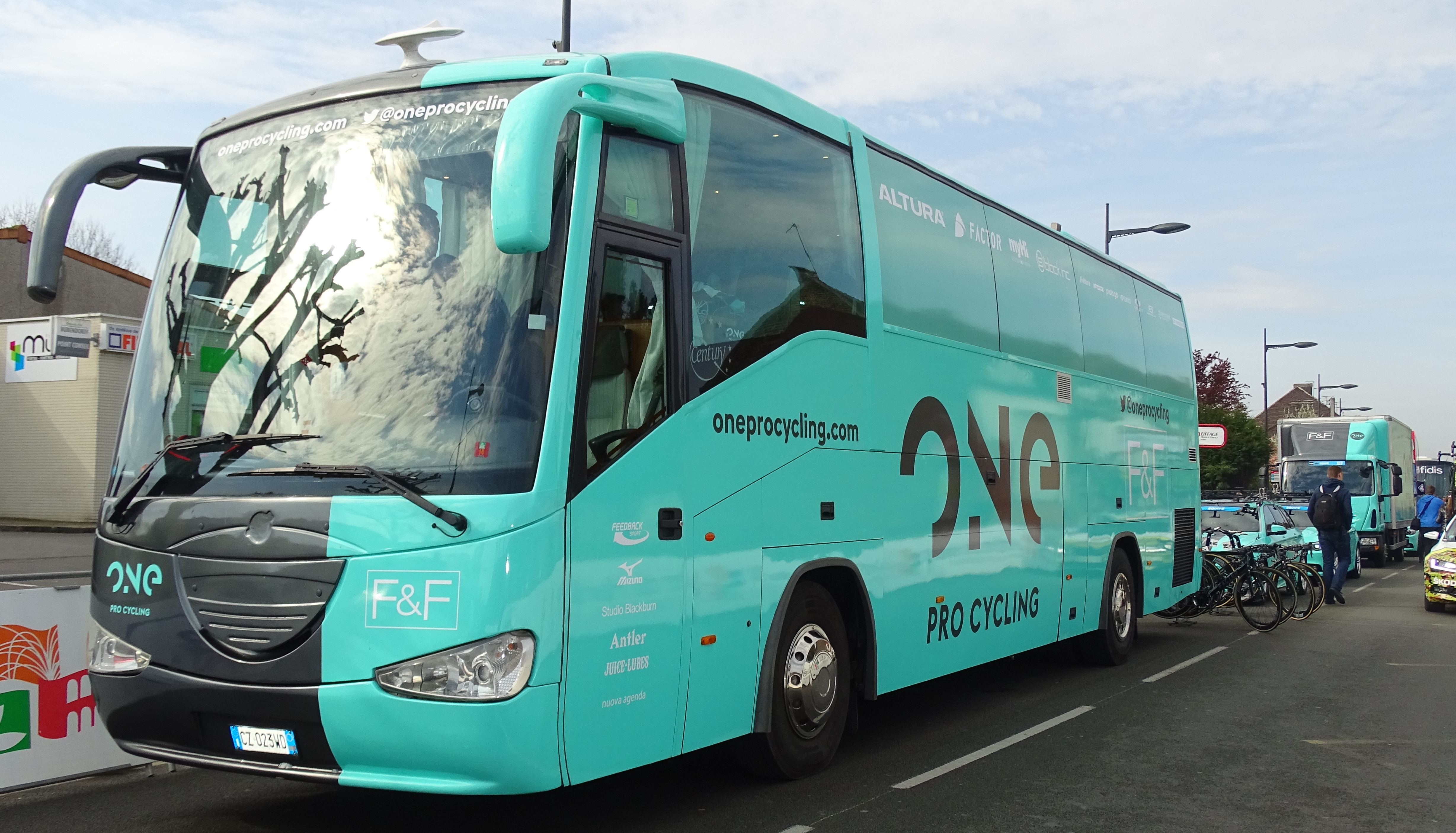 Reportage réalisé le jeudi 14 avril à l'occasion du départ et de l'arrivée du Grand Prix de Denain 2016 à Denain, Nord, Nord-Pas-de-Calais-Picardie, France.